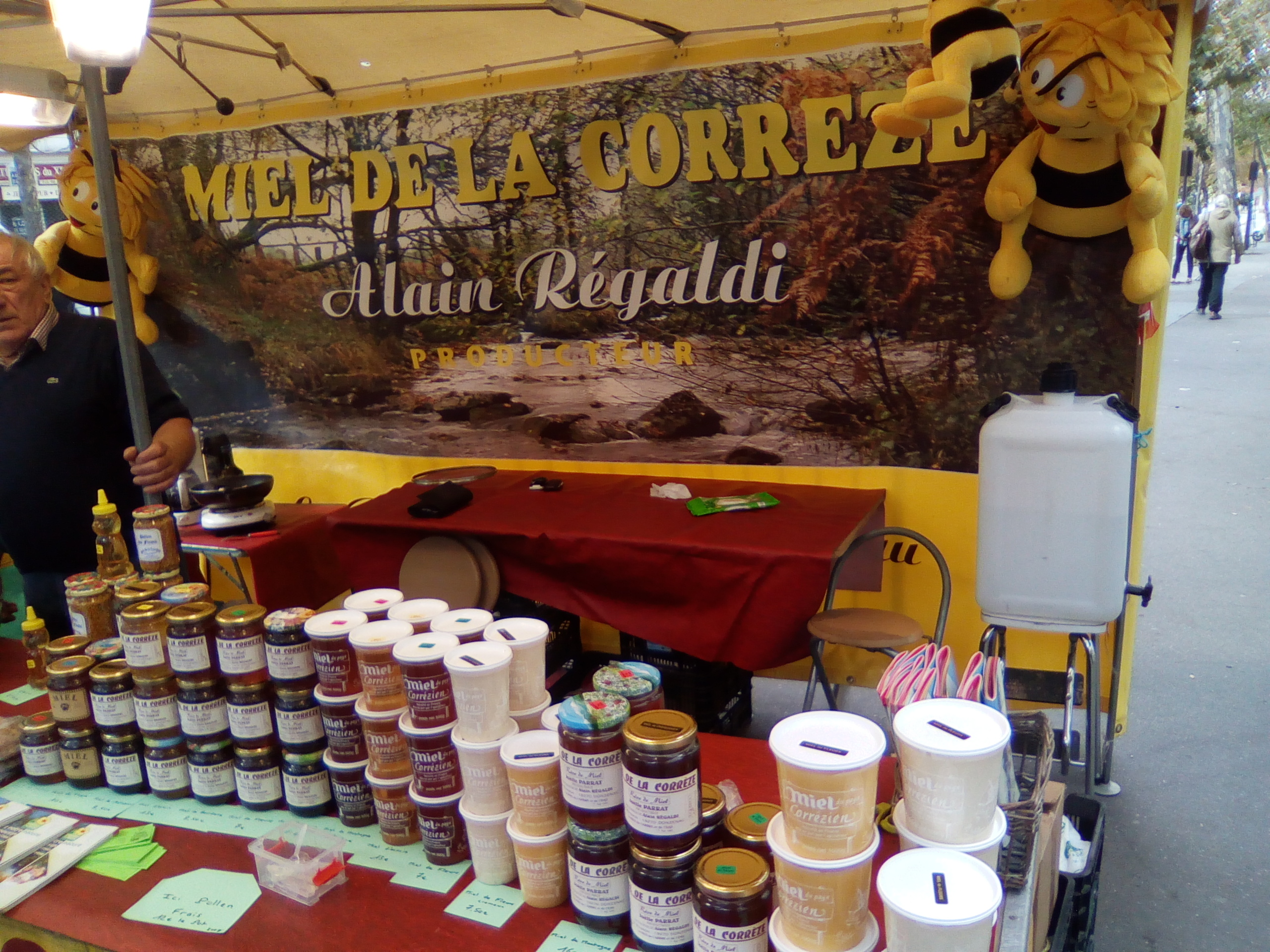 Stand au marché des producteurs de pays, boulevard de Reuilly à Paris.